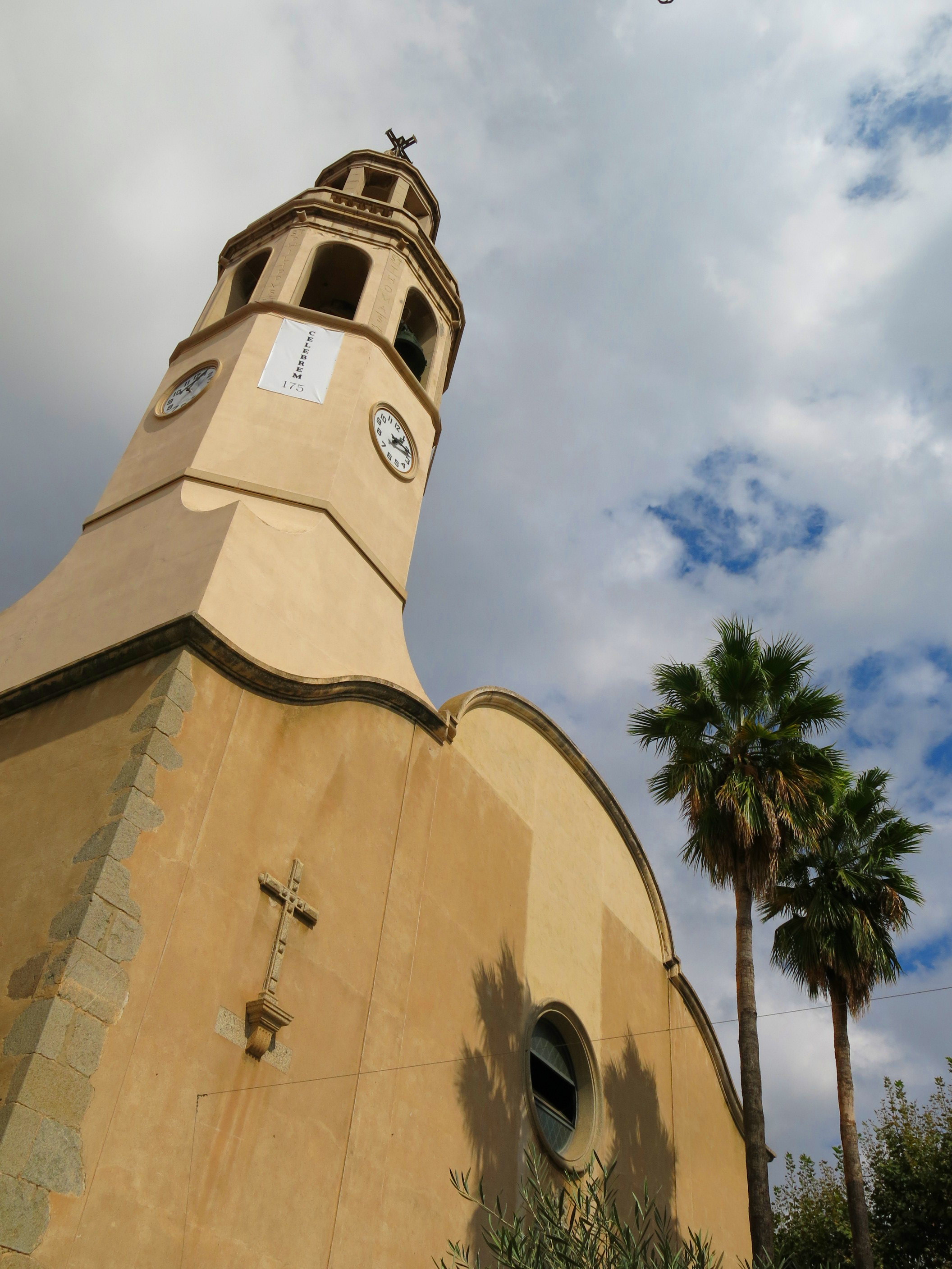 Església parroquial de Sant Cristòfol de Premià (Premià de Mar)